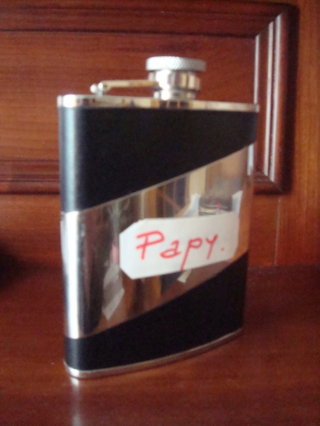 Topette de poche (acier inox)